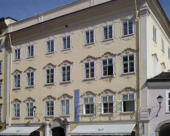 Bürgerhaus, Rehlingen-Stadtpalais